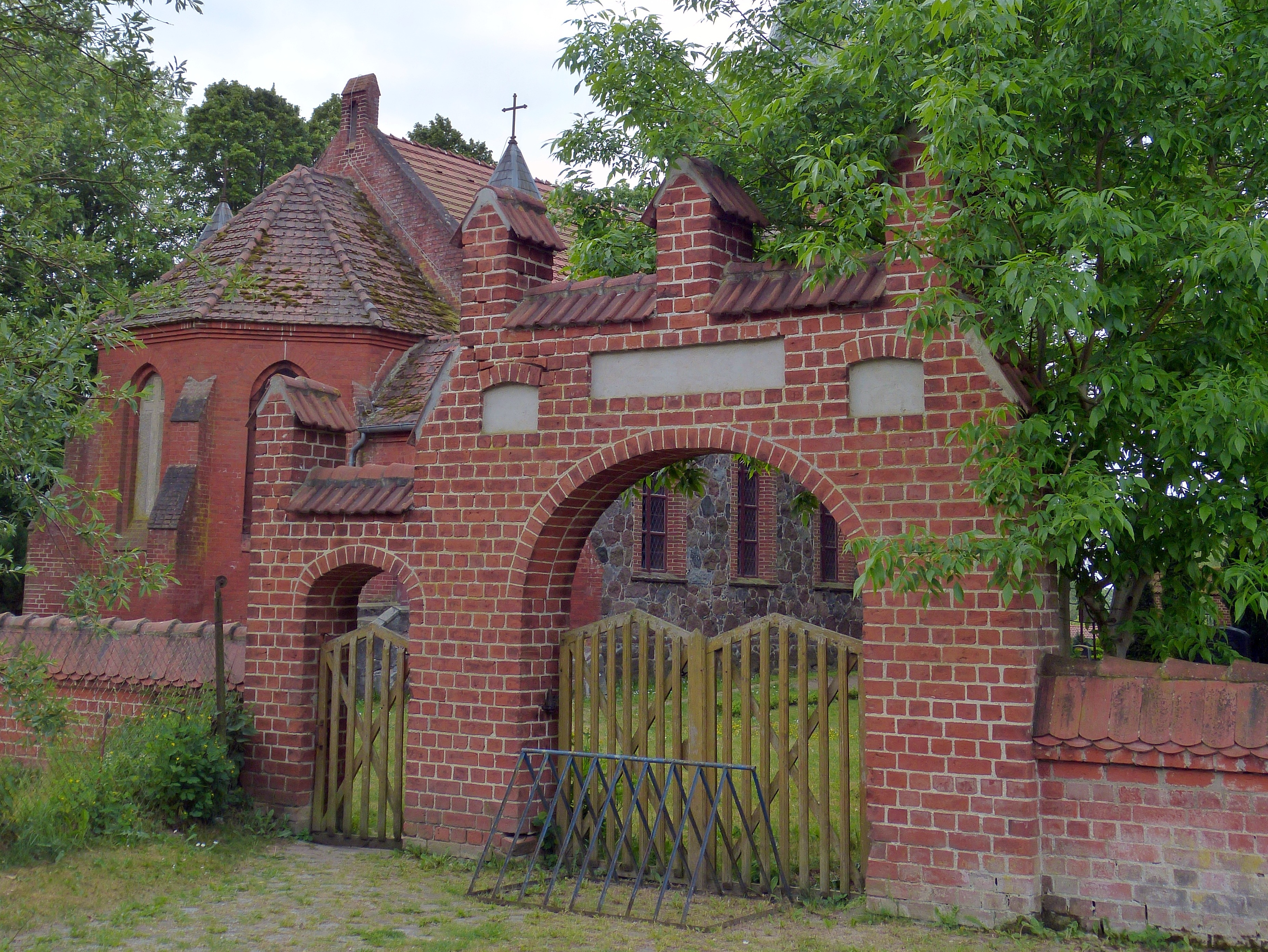 Bretwisch, Ostportal des Kirchhofs